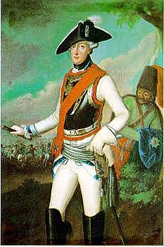 Portrait of Friedrich Wilhelm von Seydlitz (1721-1773)